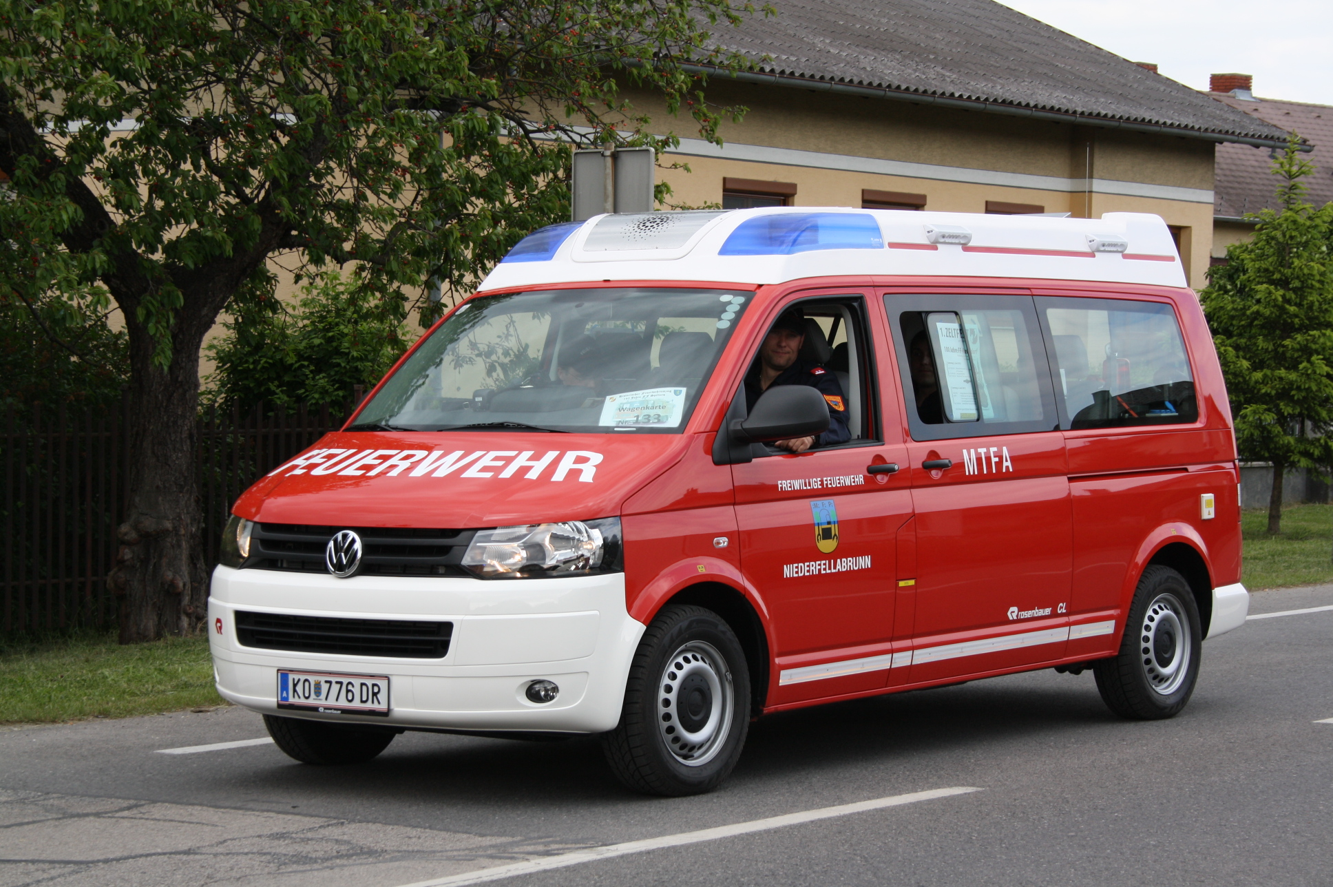 Mannschaftstransportfahrzeug der Feuerwehr Niederfellabrunn